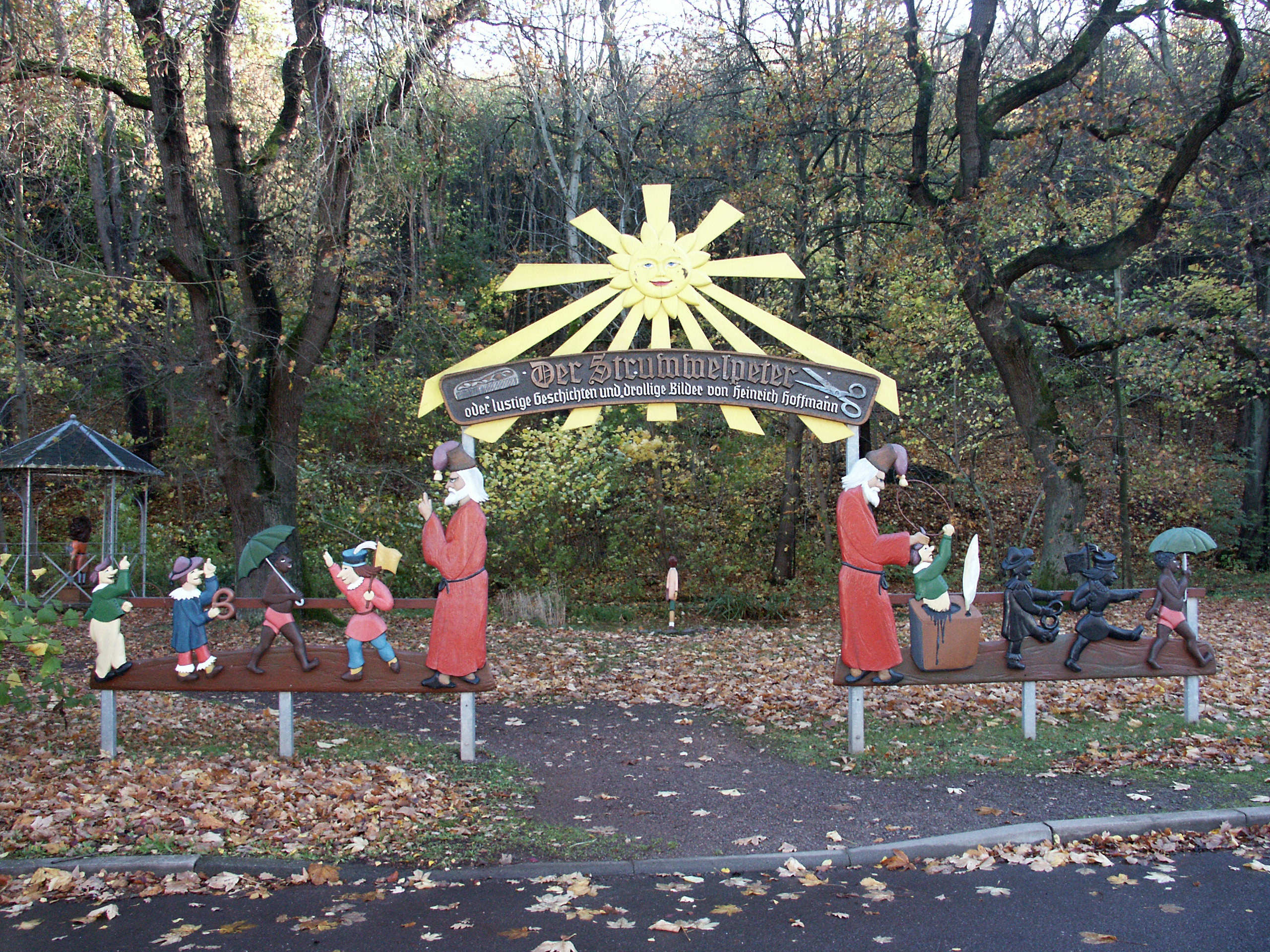 Struwwelpeter-Park Tabarz, geschnitzte Märchenfiguren "Die Geschichte von den schwarzen Buben", Eingangsbereich des Struwwelpeter-Parkes